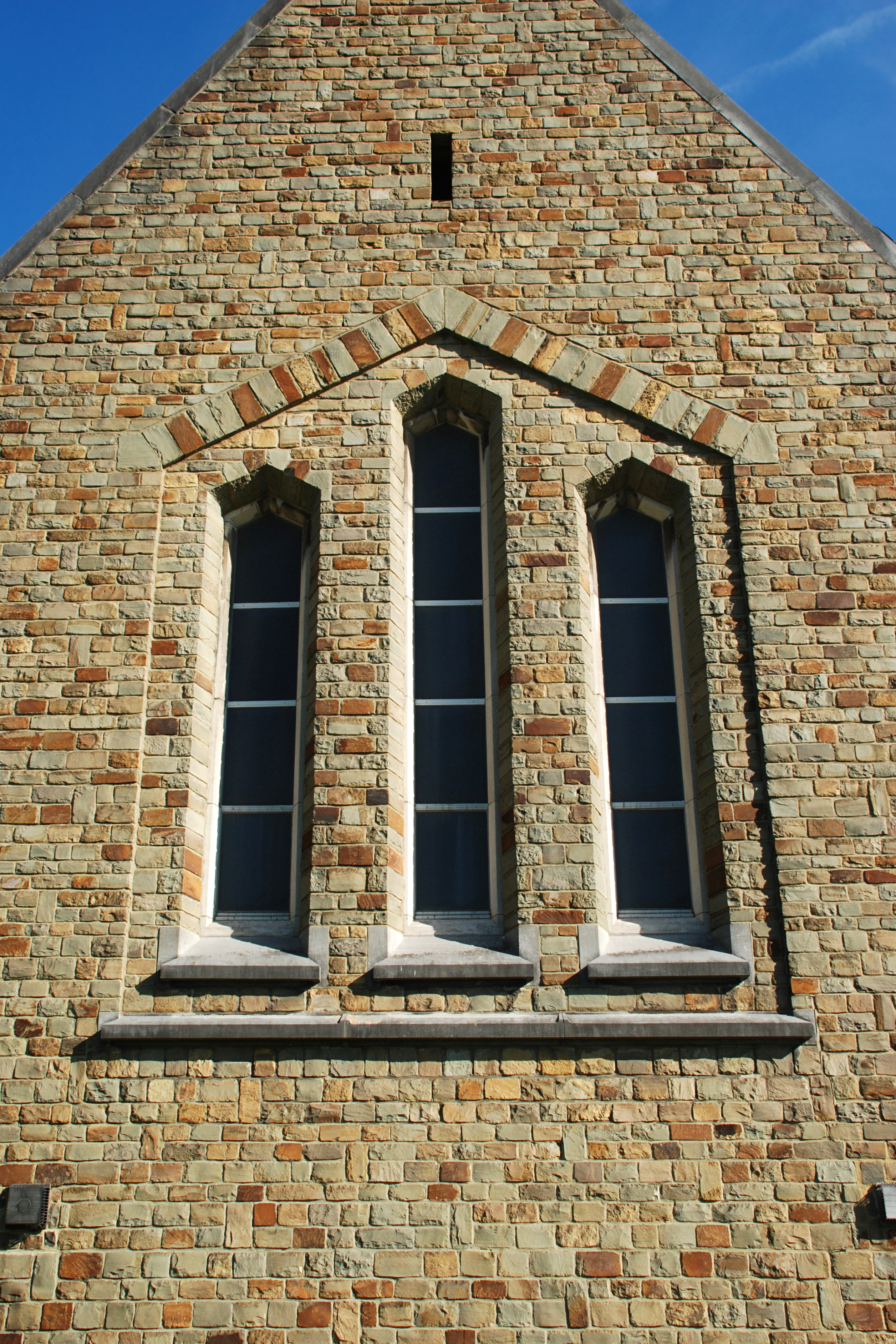 Belgique - Babant wallon - Ottignies - Eglise Saint-Géry de Limelette (néo-roman 1955)